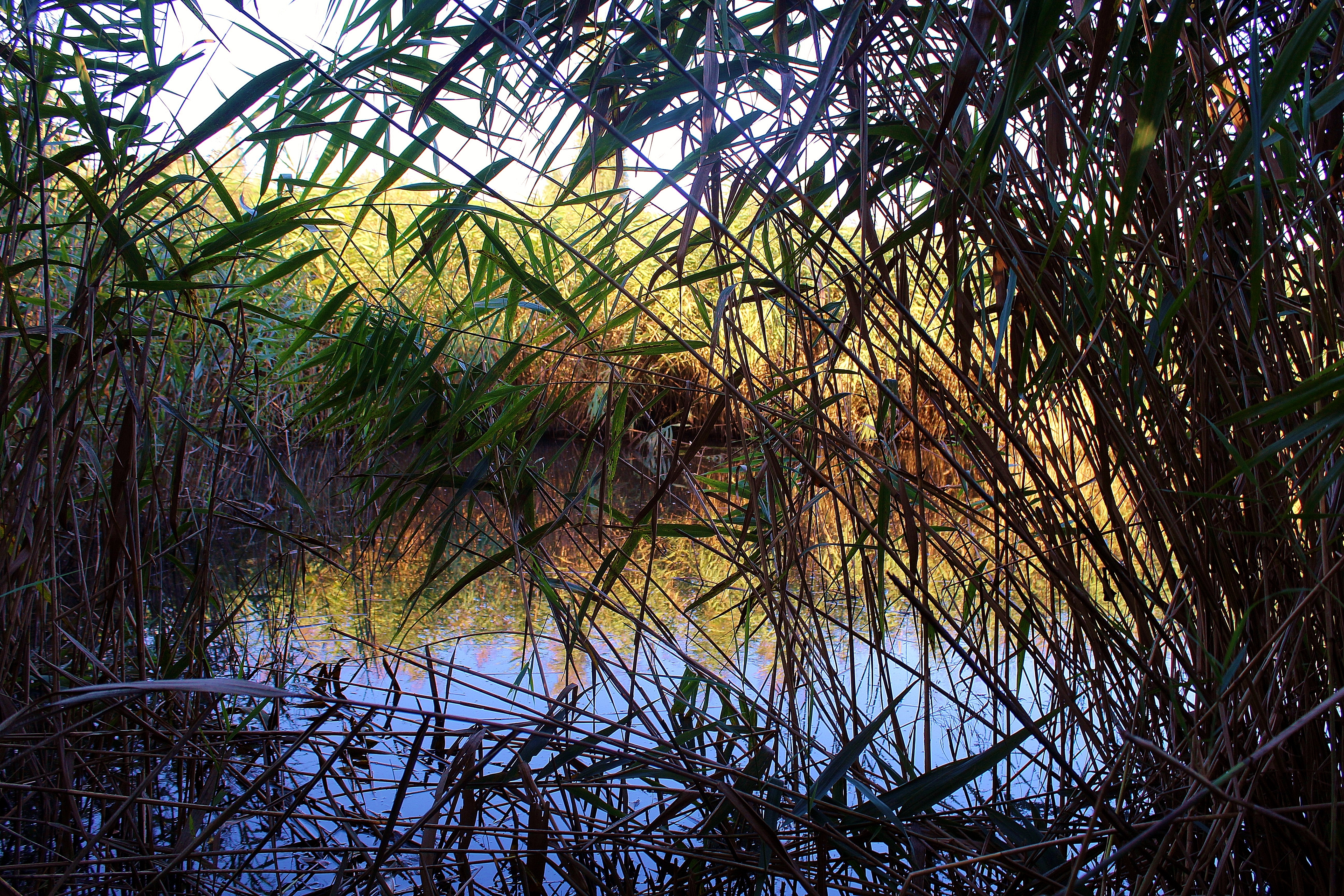 Bojo della Ferriana This is a photo of a monument which is part of cultural heritage of Italy. The authorisation for taking photos of this object was provided by the World Wide Fund for Nature Italy.